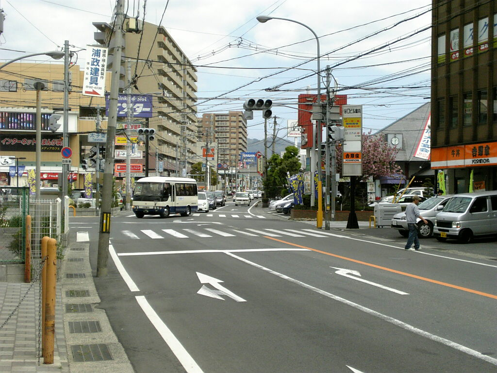 国道25号・府道(旧)大阪中央環状線 太子堂交差点（八尾市太子堂）